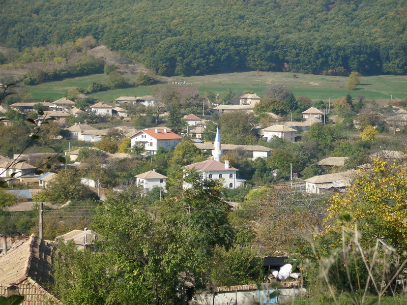 Село Зараево, община Попово. Поглед към централната му част.